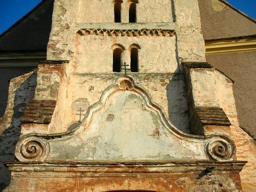 A kővágószőlősi templom homlokzata